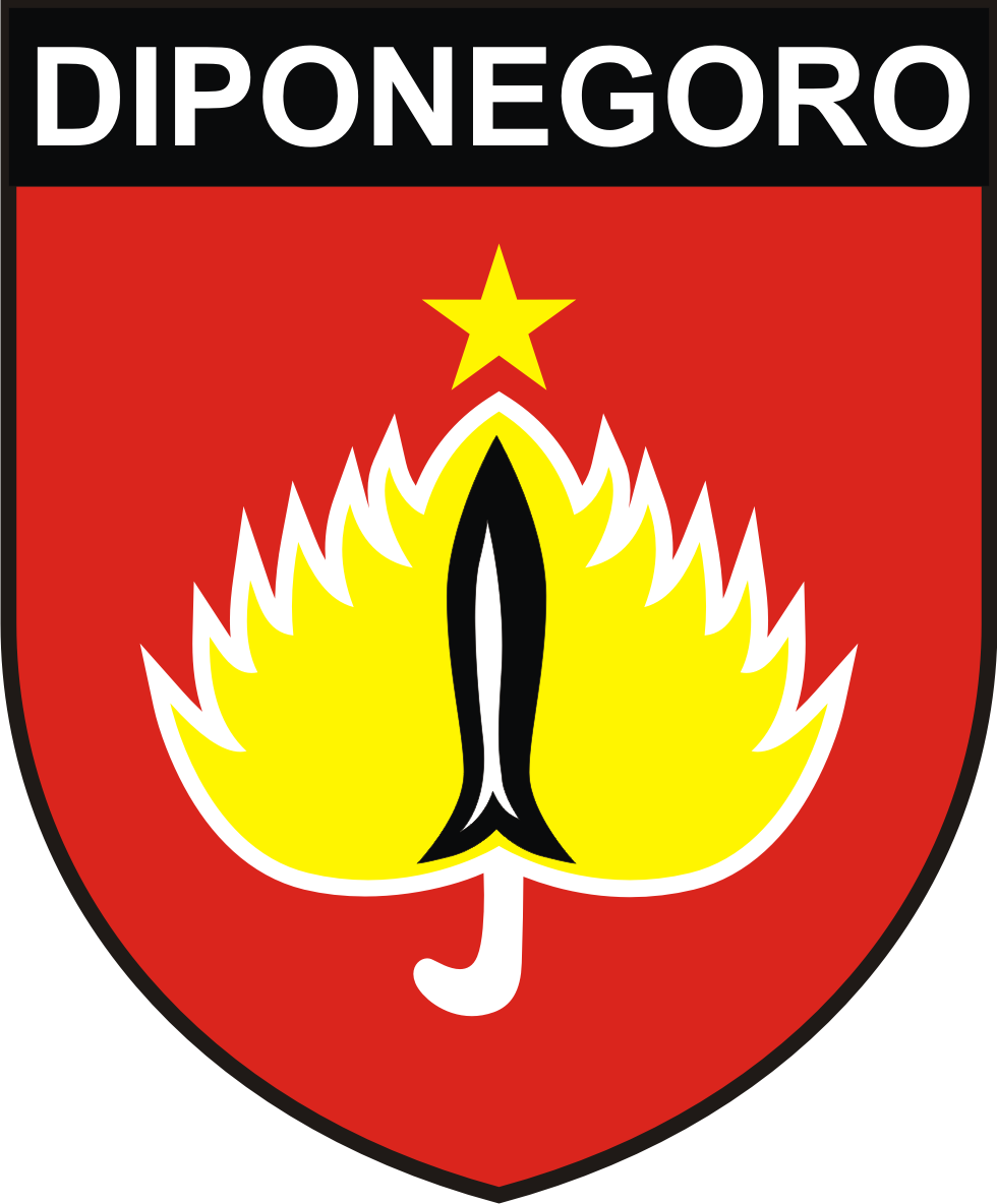 Gambar ini adalah Lambang Kodam IV/Diponegoro